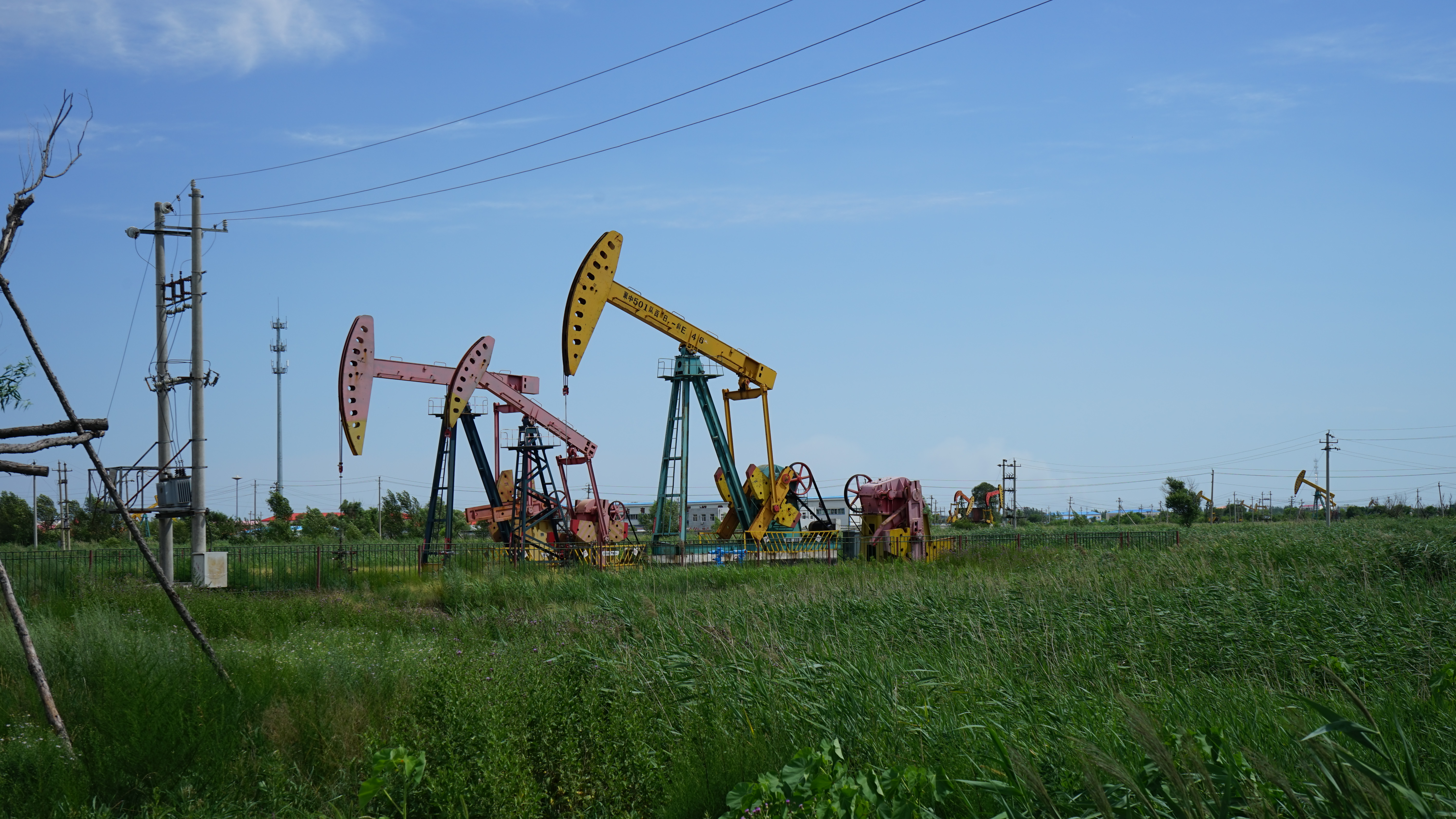 中文（中国大陆）: 大庆油田第一采油厂第三油矿抽油机